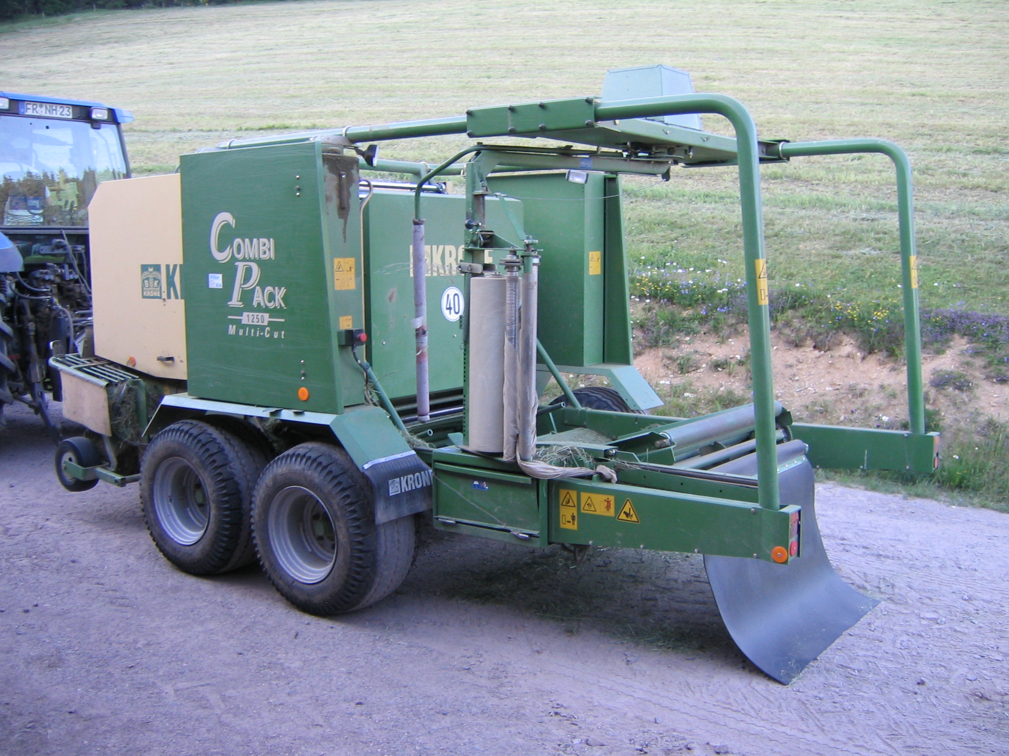 Die Rundballenpress-Wickelkombination Krone CombiPack 1250 Multi-Cut